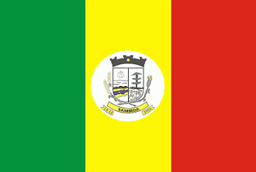 Bandeira do município de Xambioá